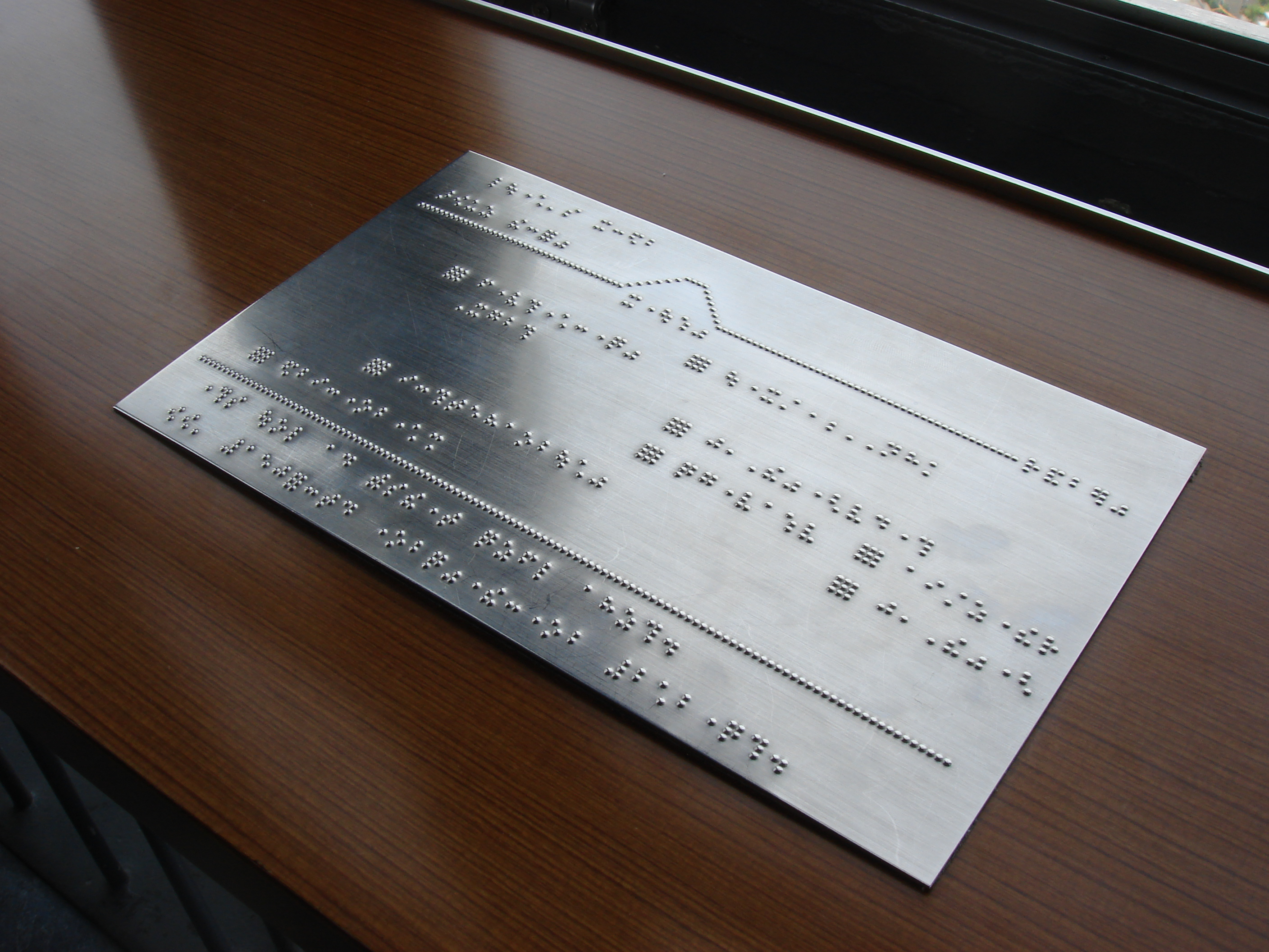 東京タワーの大展望台にある点字表記。